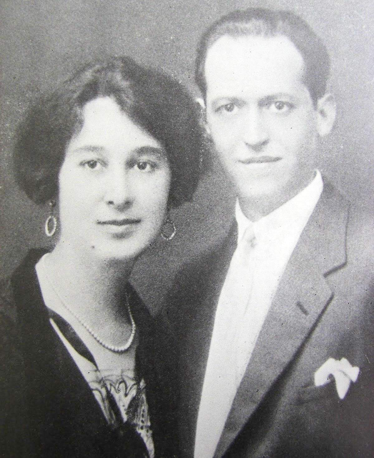 Josefa García Segret e seu esposo Hipólito Gallego Camarero en 1930, ámbolos dous Mestres